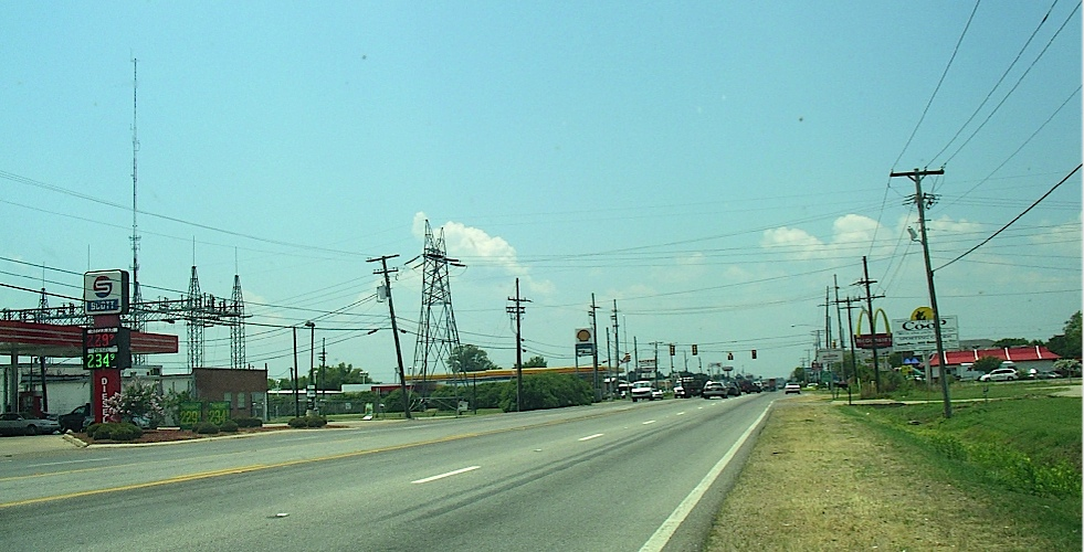 Am Ortseingang von Greenville